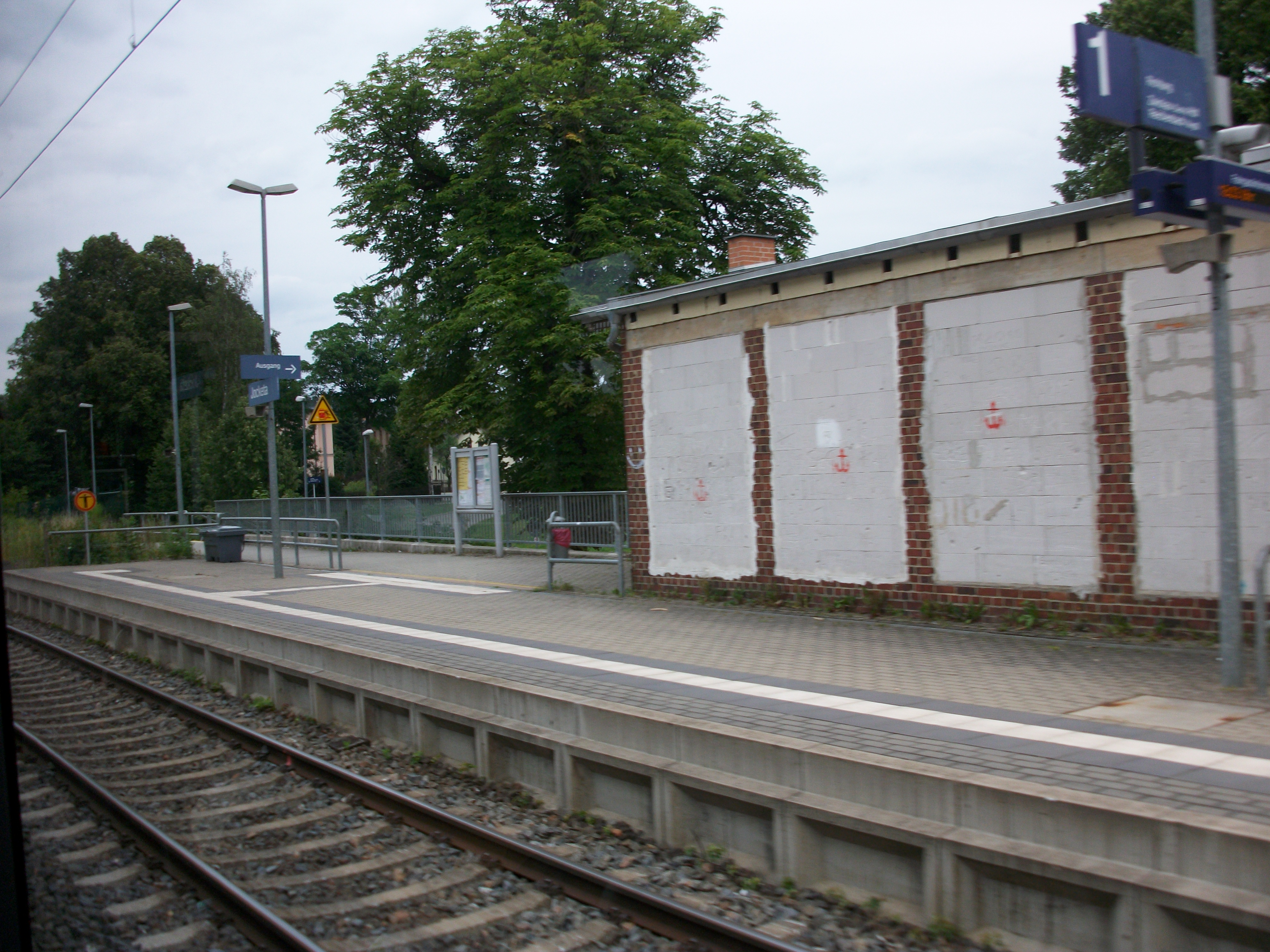 Haltepunkt Jocketa (2017)